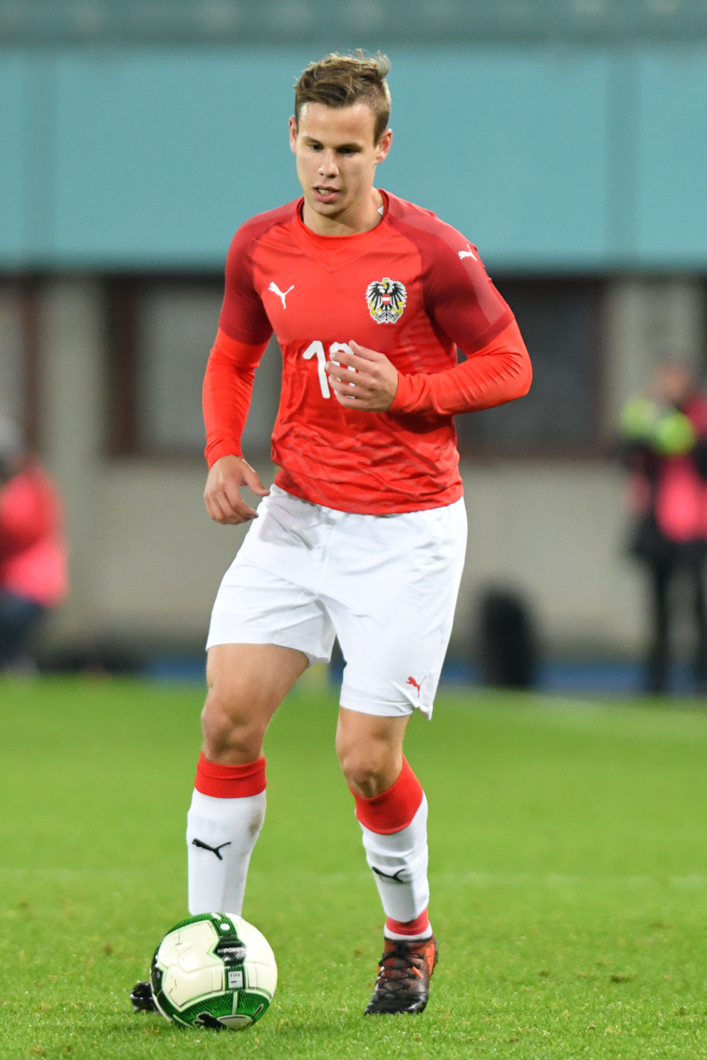 Wien, Österreich, 14.11.2017, Sport, Fussball, OEFB Freundschaftliches Laenderspiel - Österreich vs Uruguay. Bild zeigt Louis Schaub (AUT).